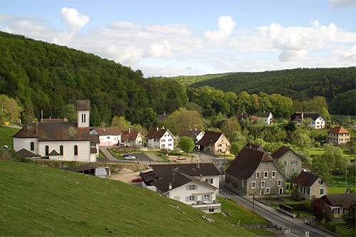 Courchavon